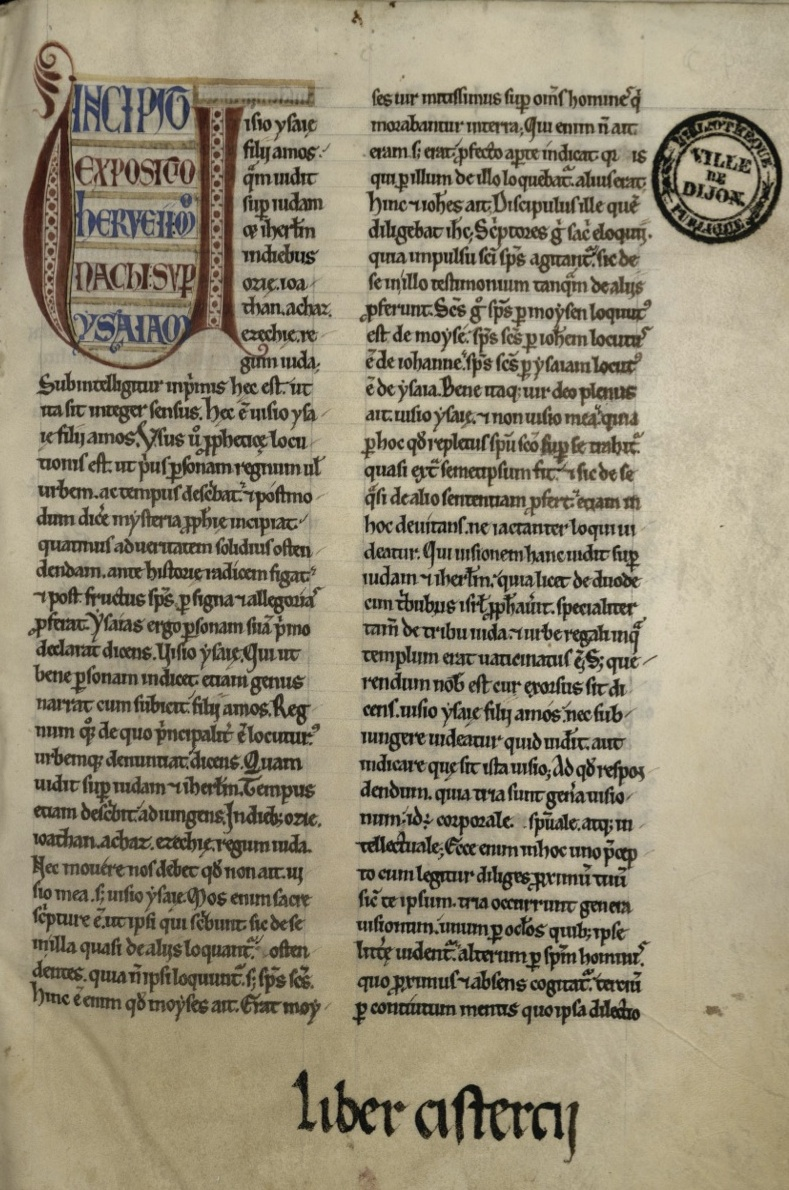 Folio 2 du manuscrit "Comment. in Isaiam" de Hervé de Déols